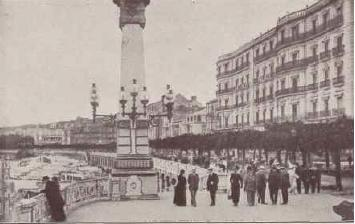 Continental Hotela irudia 1915